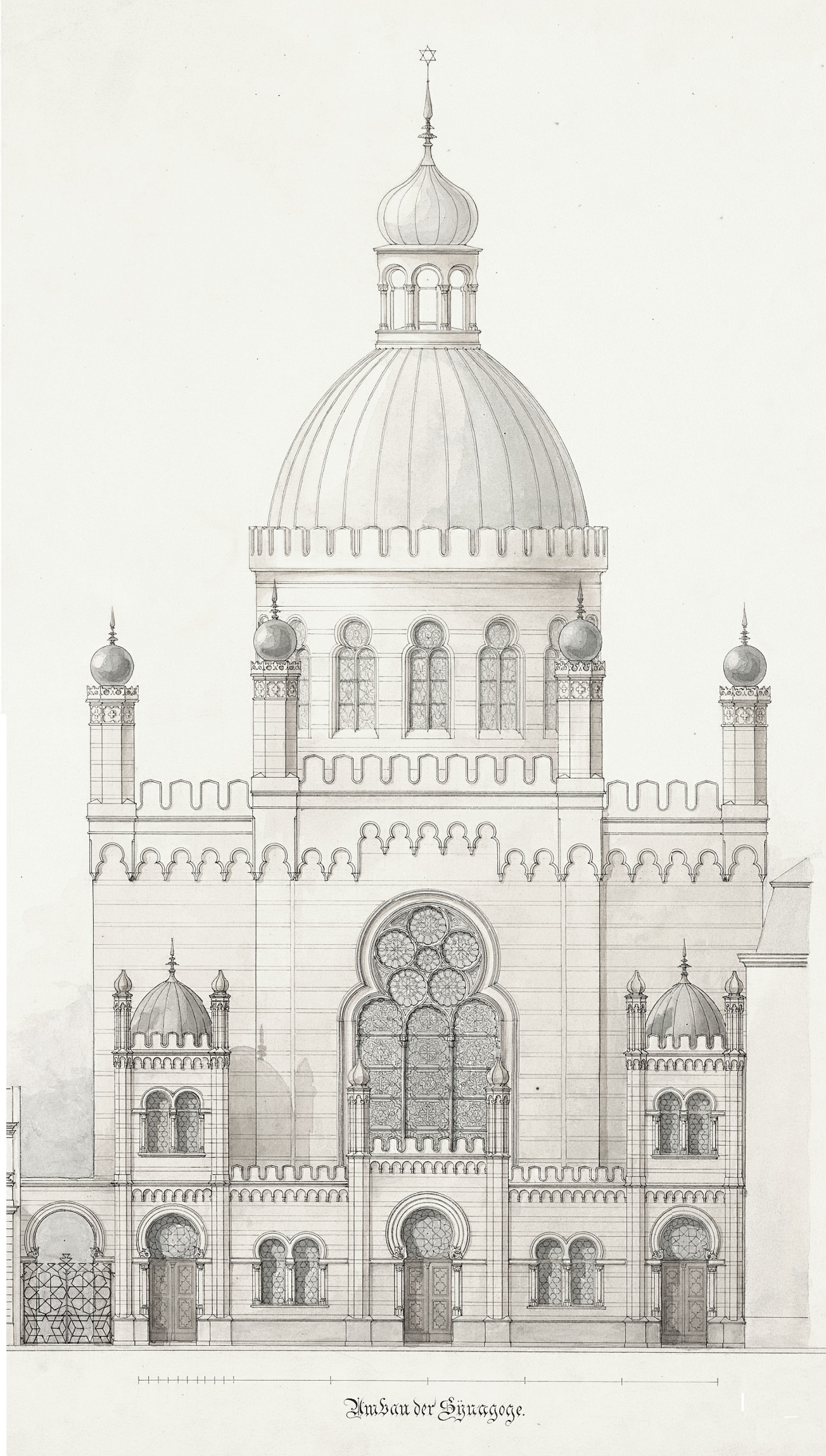 aquarelliert Tuschezeichnung auf Karton für den Entwurf der Jüdischen Synagoge in der Kölner Glockengasse (Ausschnitt vom Original 65,5 x 48,1 cm)